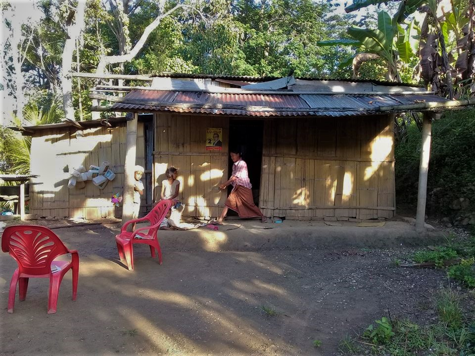 Wohnhaus in Tiarlelo, Atsabe, Ermera, Osttimor